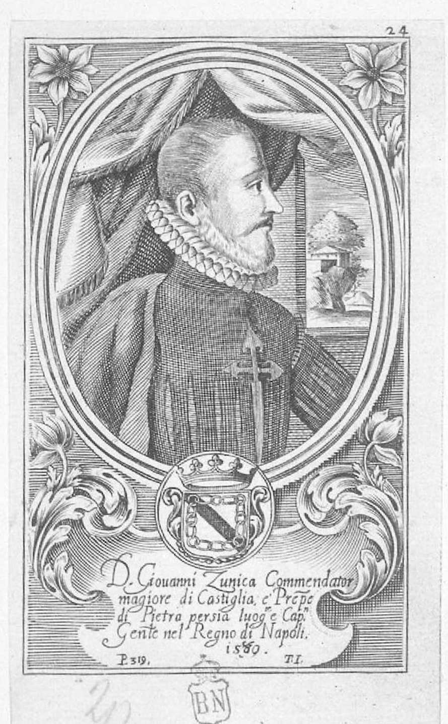 Juan de Zúñiga. Grabado calcográfico anónimo recogido en Teatro eroico, e politico de'governi de'Vicere del Regno de Napoli, de Domenico Antonio Parrino, Nápoles, 1692-1695. Biblioteca Nacional de España